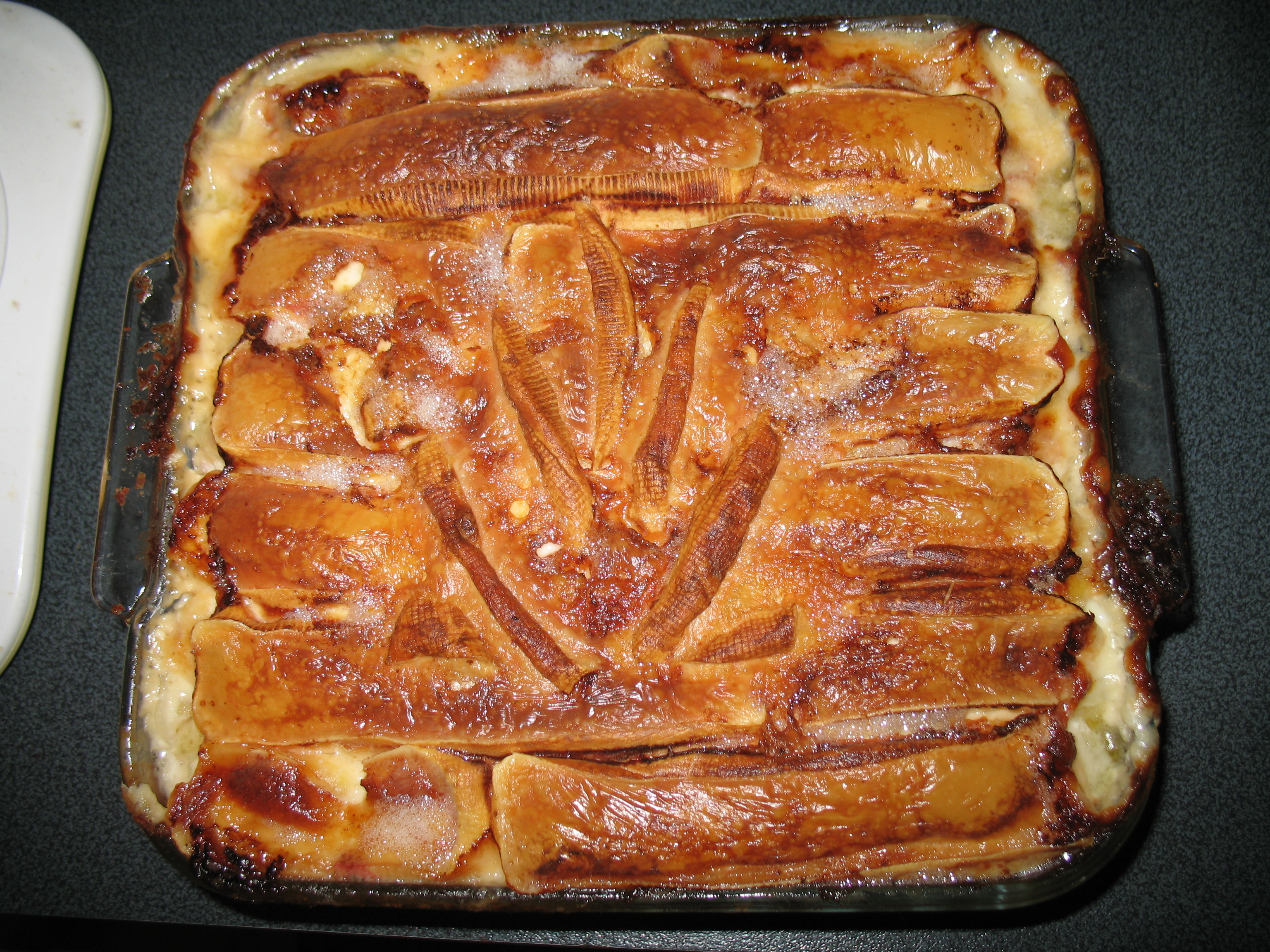 Tartiflette traditionnelle au four.